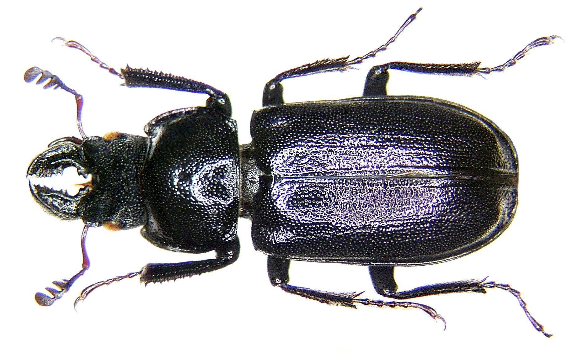 Familie: Lucanidae Grösse: 13-15 mm Verbreitung: Europa Ökologie: Entwicklung in Laubholz Fundort: Germania, Bayern, Pottenstein leg.det. U.Schmidt, 1995 Foto: U.Schmidt, 2006